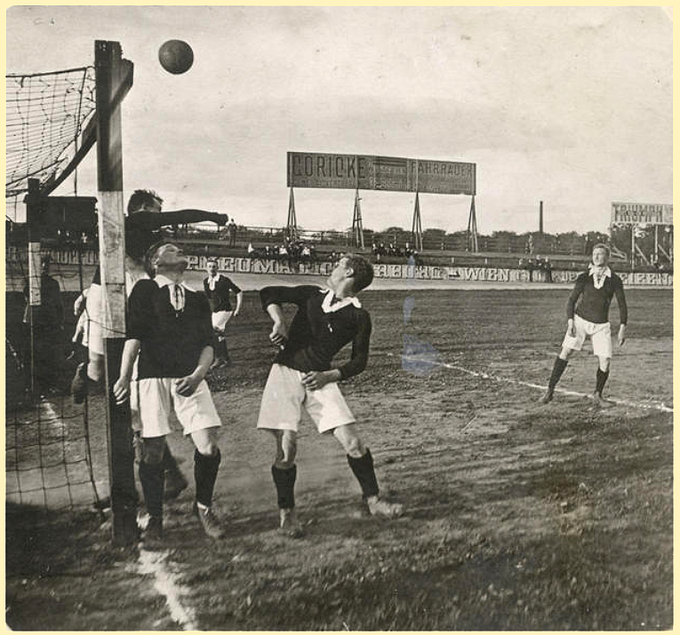 Auf dem Feld der ehemaligen Radrennbahn am Pferdeturm entstand diese wieder entdeckte Dokumentarfotografie während eines Fußballspieles der 1. Mannschaft von Hannover 96 gegen den Verein Holstein Kiel am 25. September 1910 mit dem Ergebnis: 1:1. Vor dem Tor der 96er ist der Torwart Krebel beim Fausten zu sehen, vorne links der Spieler Toni Denecke, rechts von im E. Staacke, im Hintergrund G.Schrader und rechts außen W. Bühring Im Hintergrund finden sich Werbebanner für Fahrräder von Göricke sowie von Triumph ...